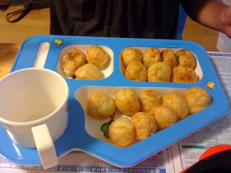 子供のたこ焼きランチ